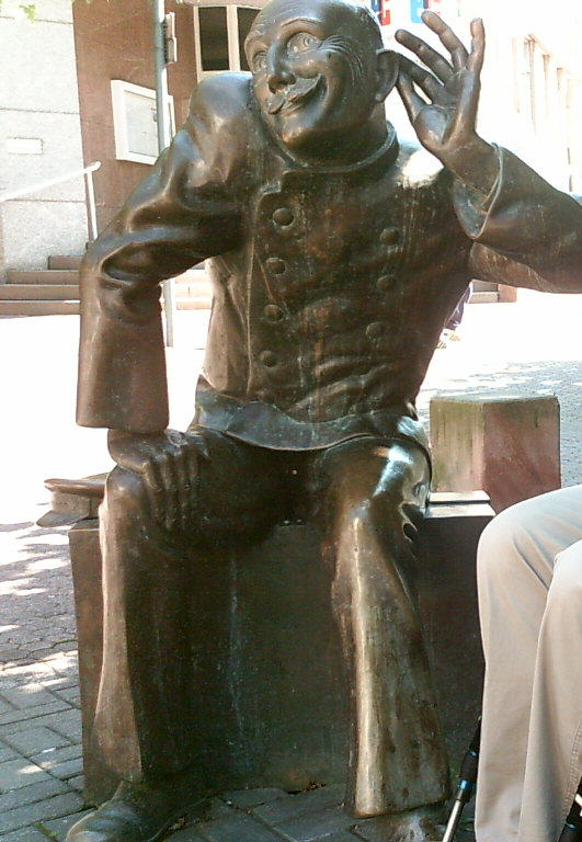 KARL FRANZ EDUARD SENZ (geboren am 30. Dezember 1877 in Wiebelskirchen - ermordet 1941 in Hadamar), von den Leuten oft auch Sense-Eduard genannt, verdiente als Kofferträger Dienstmann Nr. 2 lange Jahre sein Geld am Neunkircher Bahnhof. Nachdem er im Jahre 1938 erkrankte, wurde er von Nationalsozialisten in die Heil- und Pflegeanstalt nach Merzig und später nach Hadamar gebracht, wo er 1941 im Rahmen des Euthanasieprogrammes ermordet wurde. Der Sense-Eduard galt und gilt als typisches Neunkircher Original. Er war als bauernschlauer, verschmitzter und schlagfertiger Mensch bekannt.